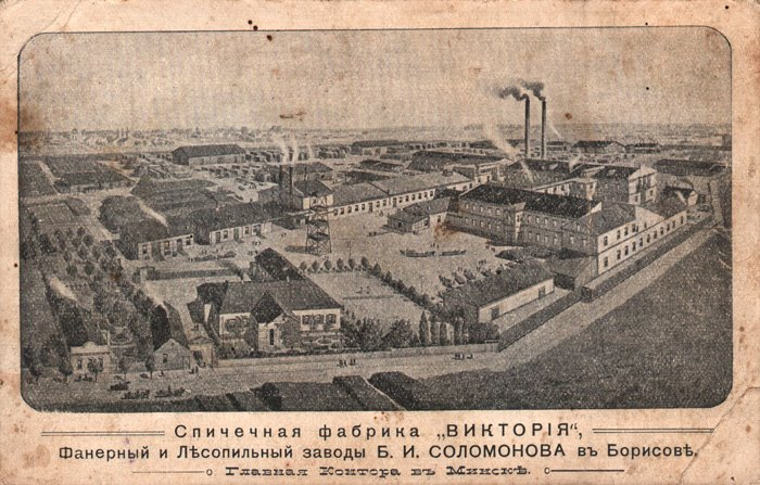 Запалкавая фабрыка «Вікторыя» Бера Саламонава ў Барысаве